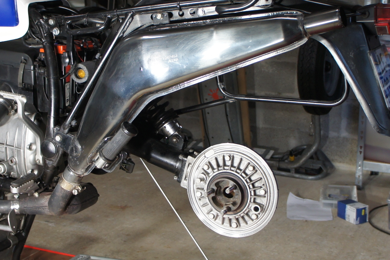 Roue et mâchoires de frein retirées. 1981